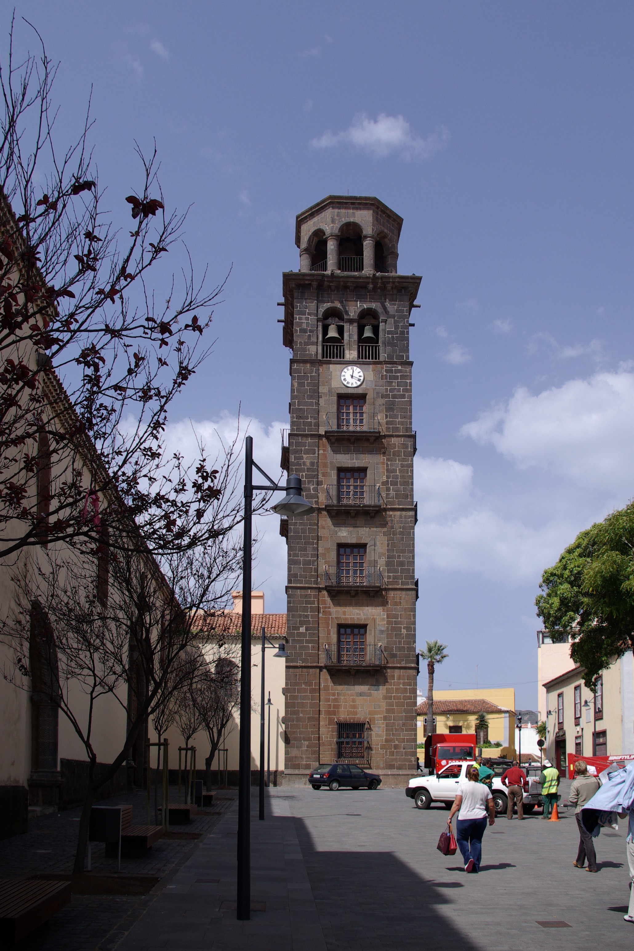 Teneriffa, La Laguna, Iglesia de La Conception